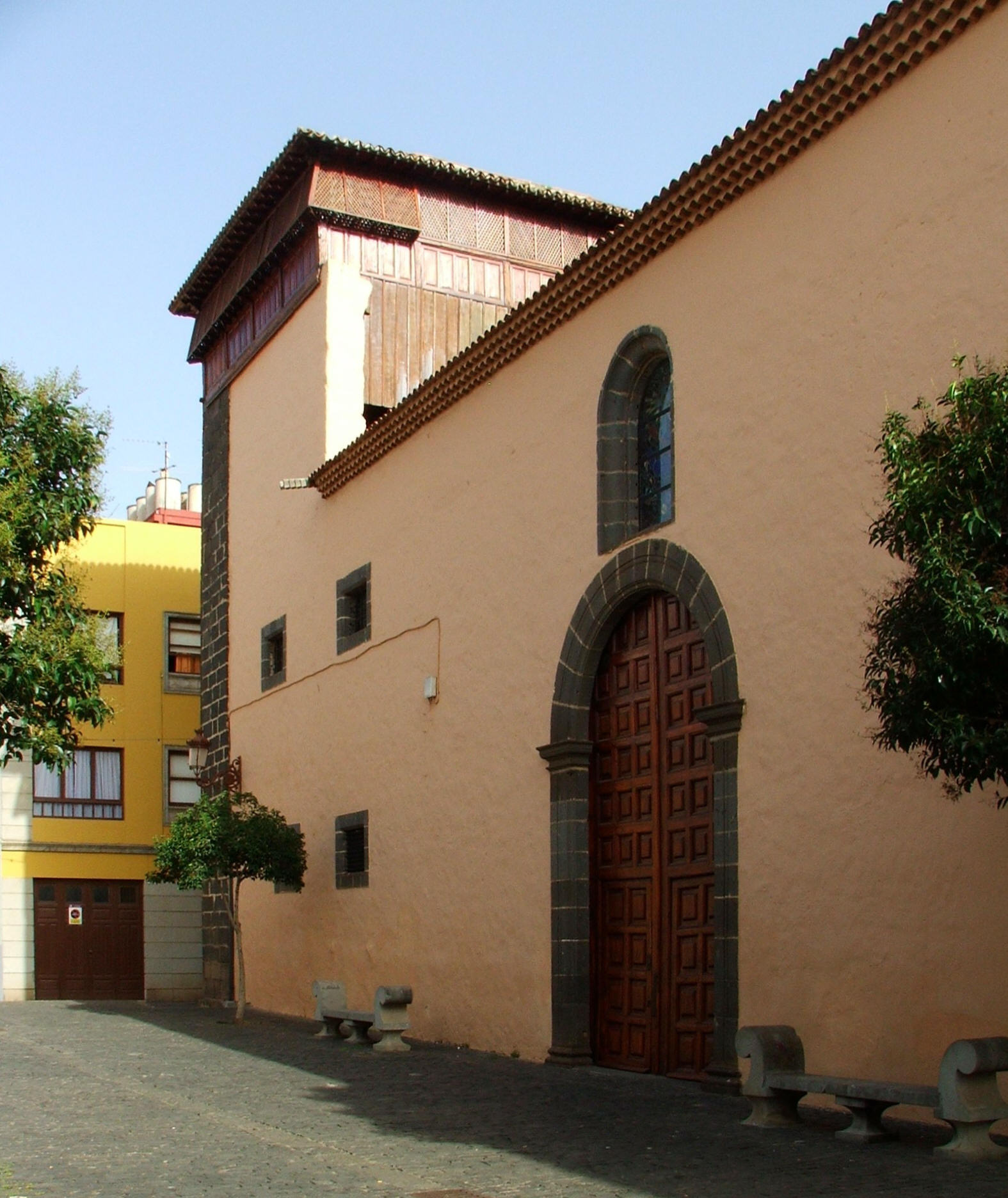 Convento Santa Clara La Laguna